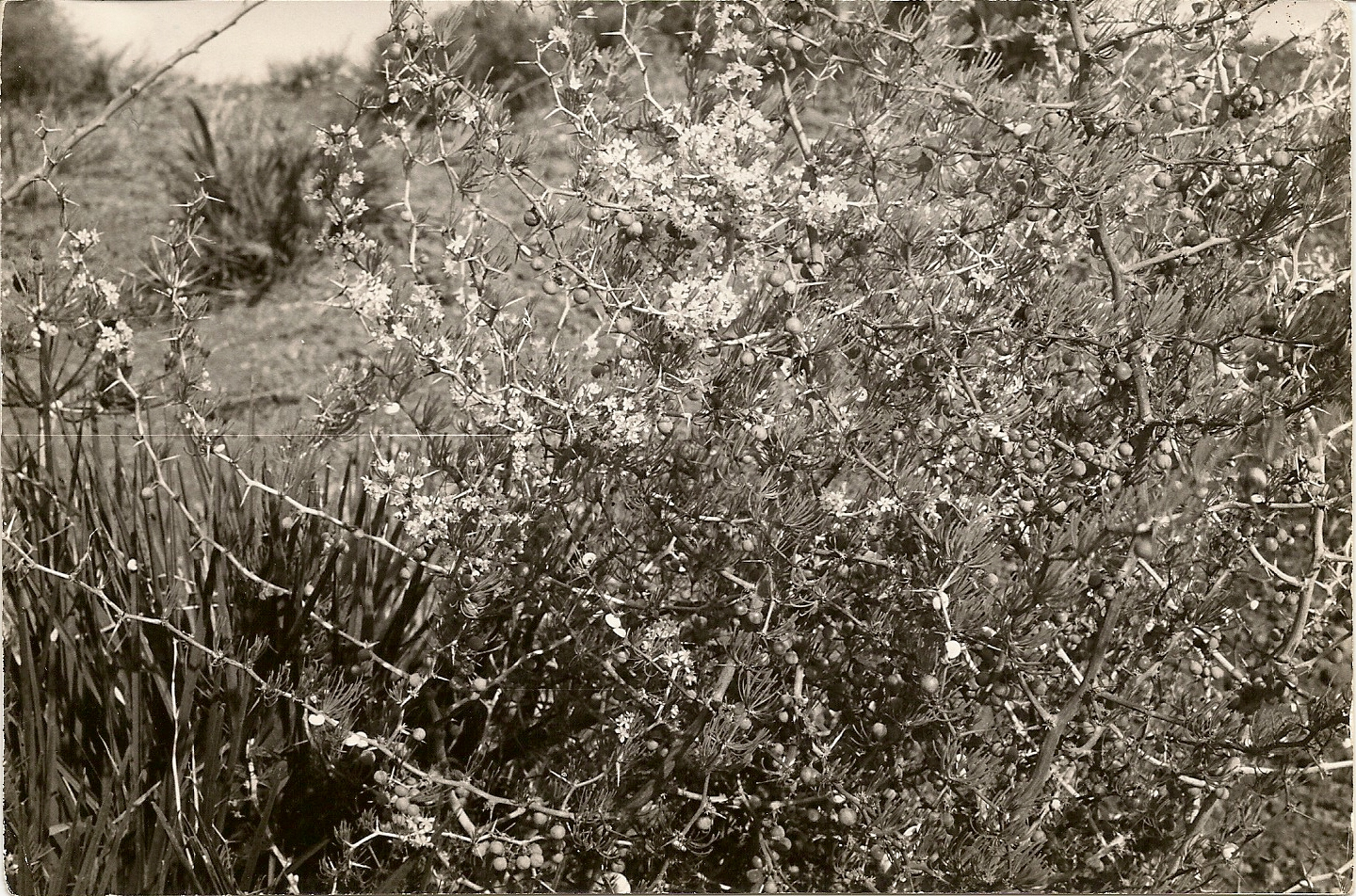 Végétation buissonnante à Asparagus albus en fleurs et Chamaerops humilis brouté